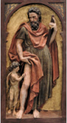 Roke santua, Orio